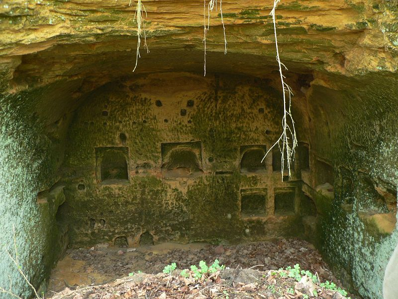 Svébořice, Ralsko, Czech Republic